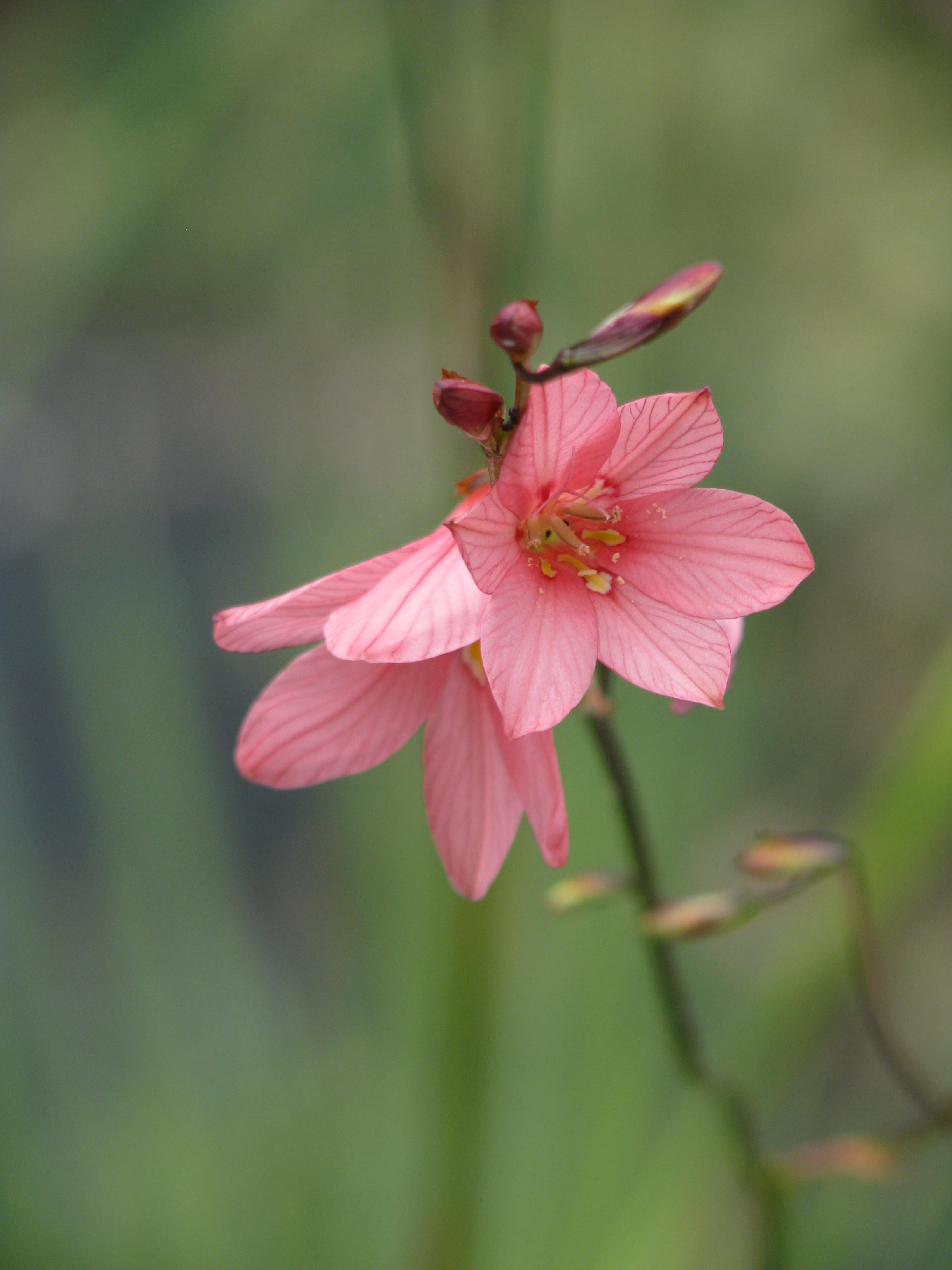 Tritonia disticha rubrolucens